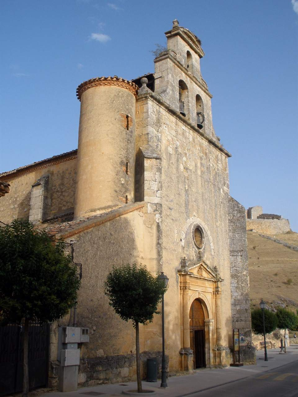 El Burgo de Osma (Osma), iglesia de Santa Cristina